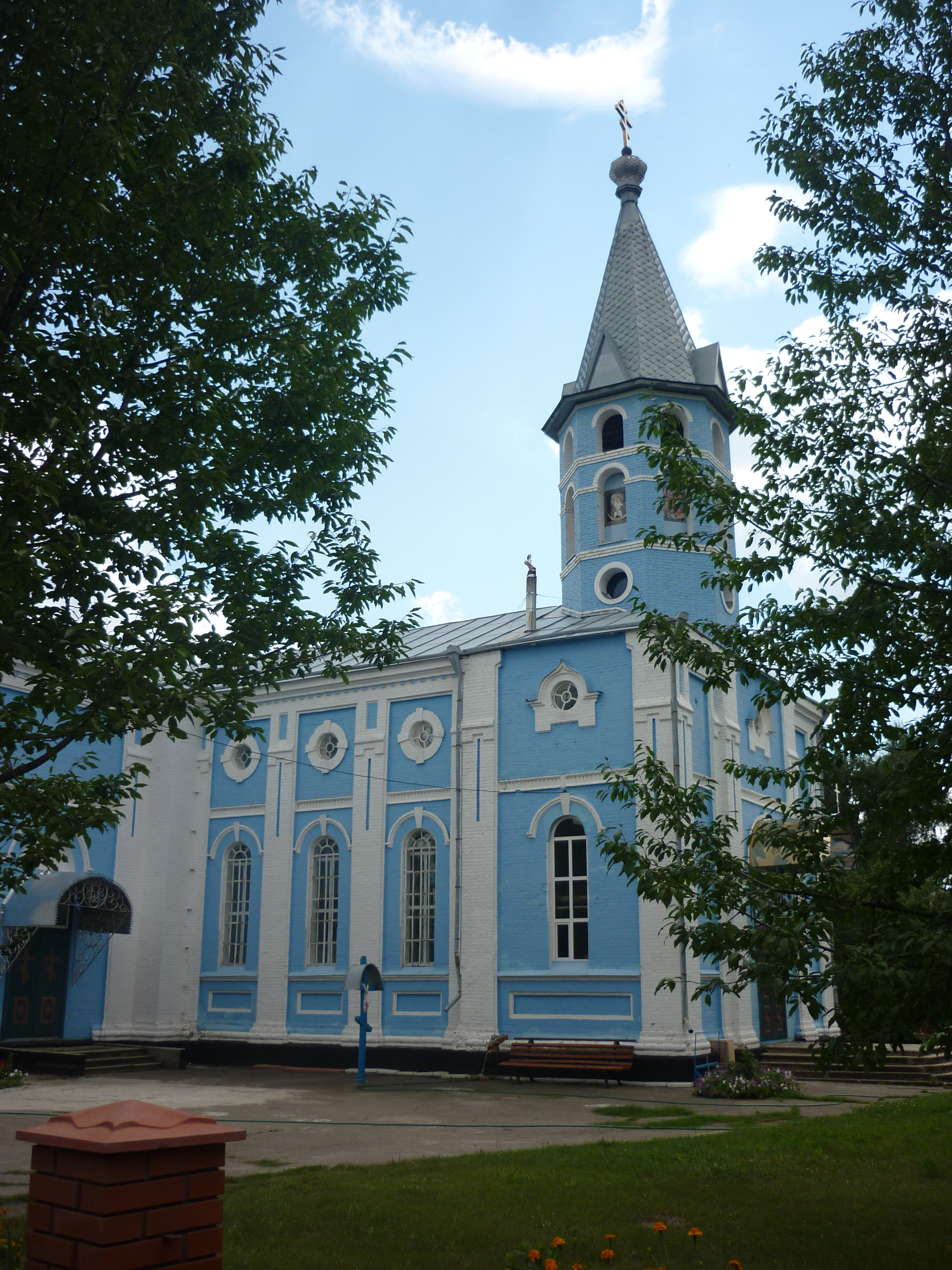 Свято-Покровська церква в селі Тальянки Тальнівського району Черкаської області